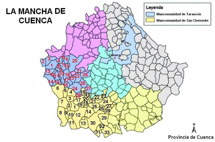 Mapa de situación de la subcomarca de "La Mancha de Cuenca", dentro de la provincia homónima.